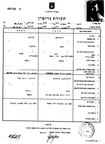 תעודת גירושין מטעם הרבנות הראשית לישראל, שנת תשי"א 1951. מתוך ארכיון עין השופט.